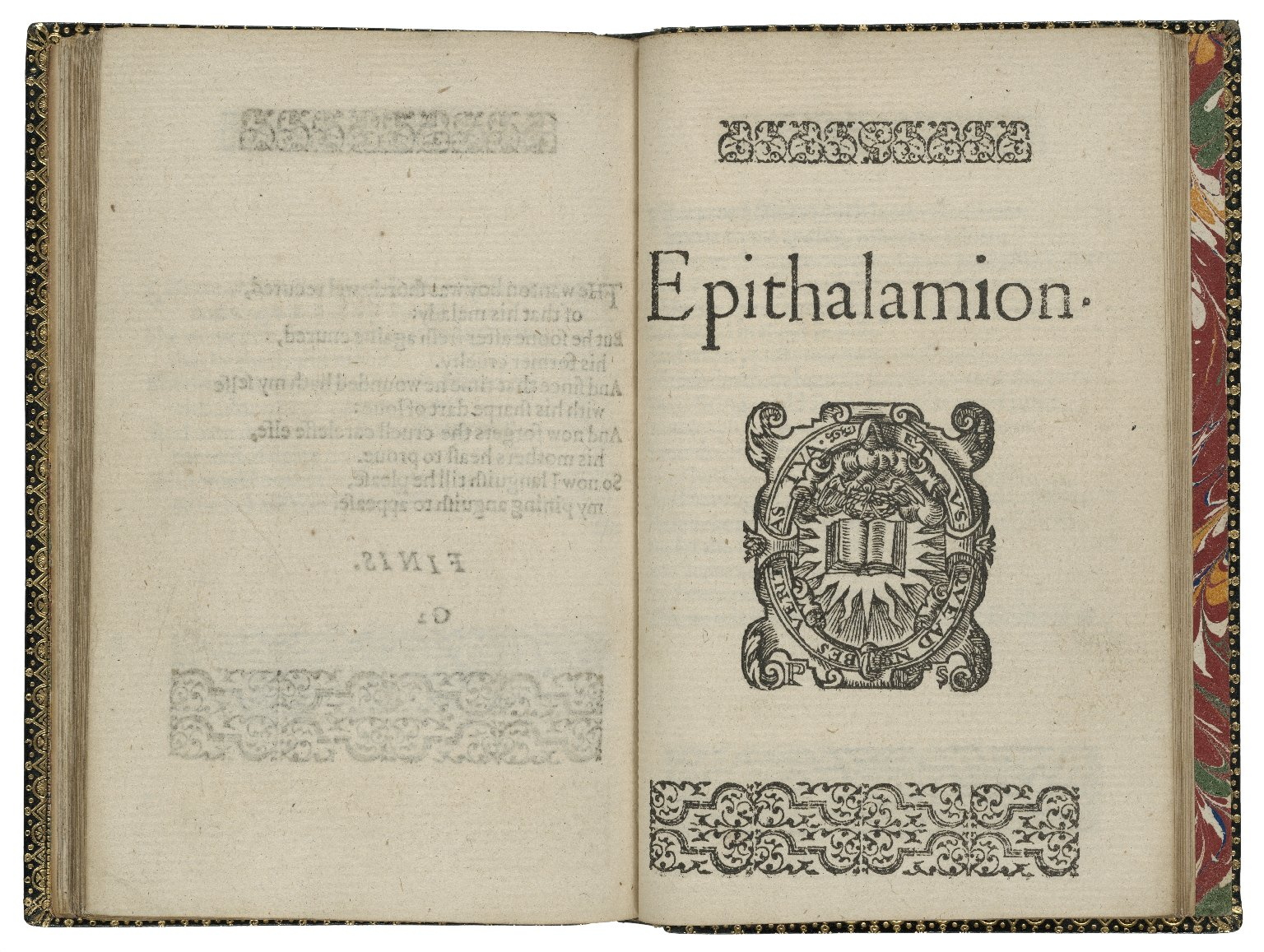 STC 23076, sig. G2v, sig. G3r